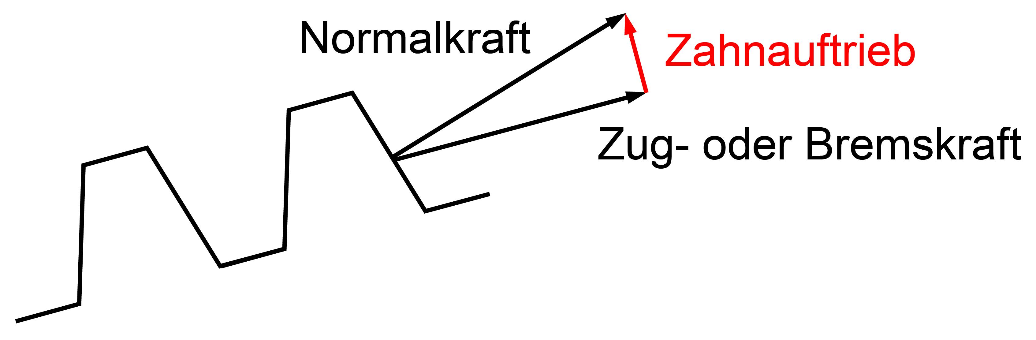 Kräfteplan des Zahneingriffs (ohne Reibung)